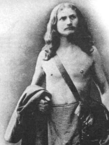 Gustaf Nagel (Original text: Schwarzweiß-Fotografie von Gustaf Nagel) Andere Versionen: keine